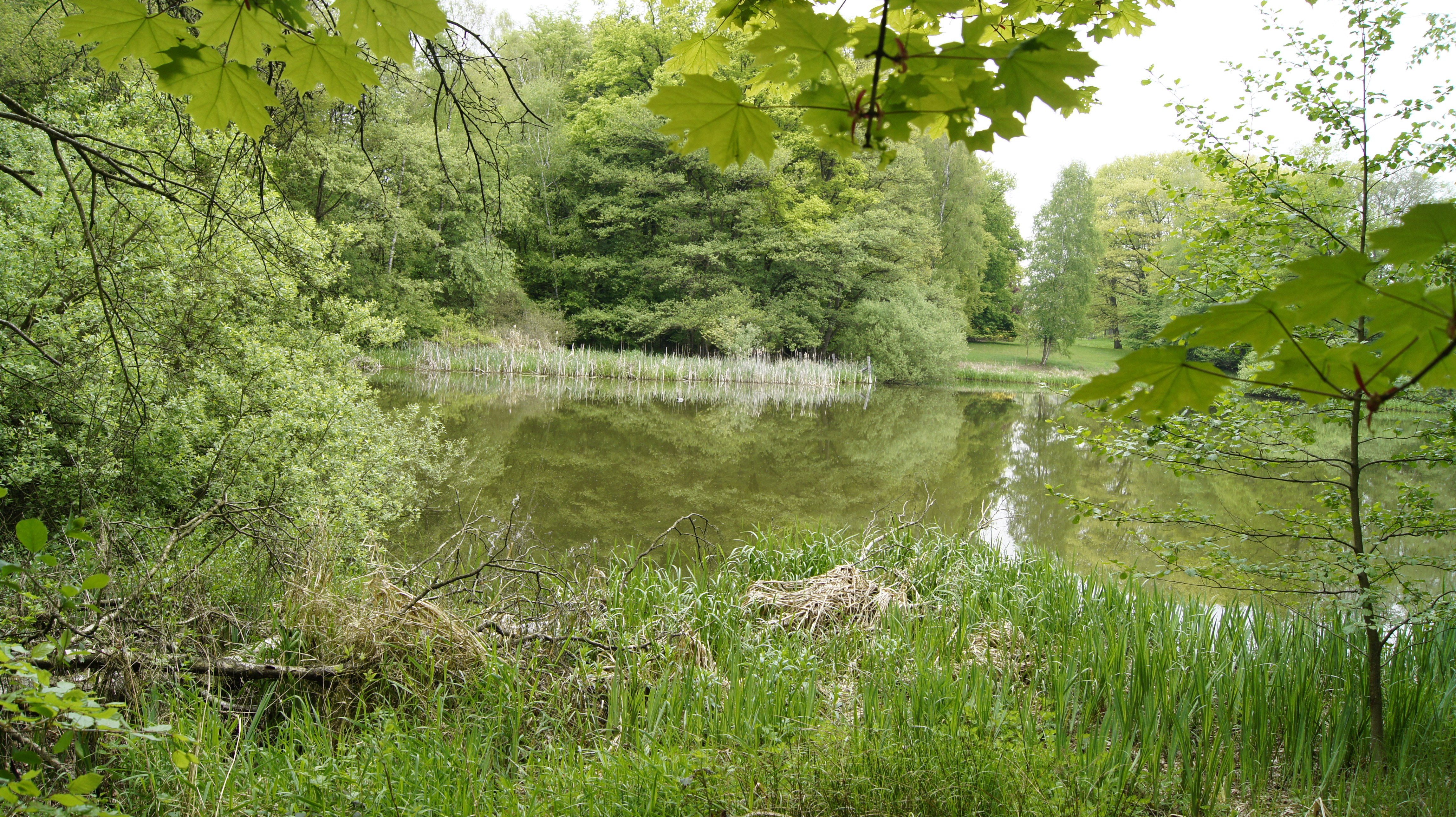 Das Ufer eines Teiches bei Hoisdorf im Naturschutzgebiet „Hoisdorfer Teiche“.